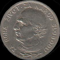 5 Slovak korún coin from 1939 - reverse